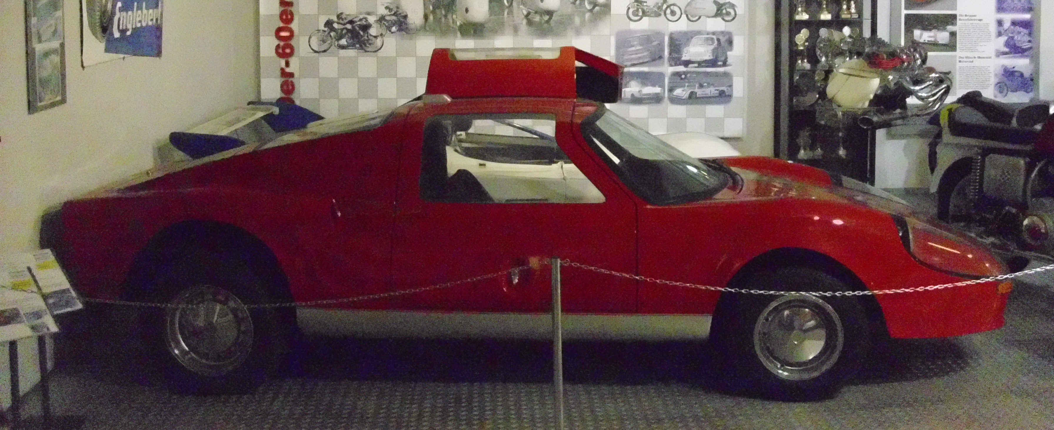 Kohlmus Scirocco 1969-1972